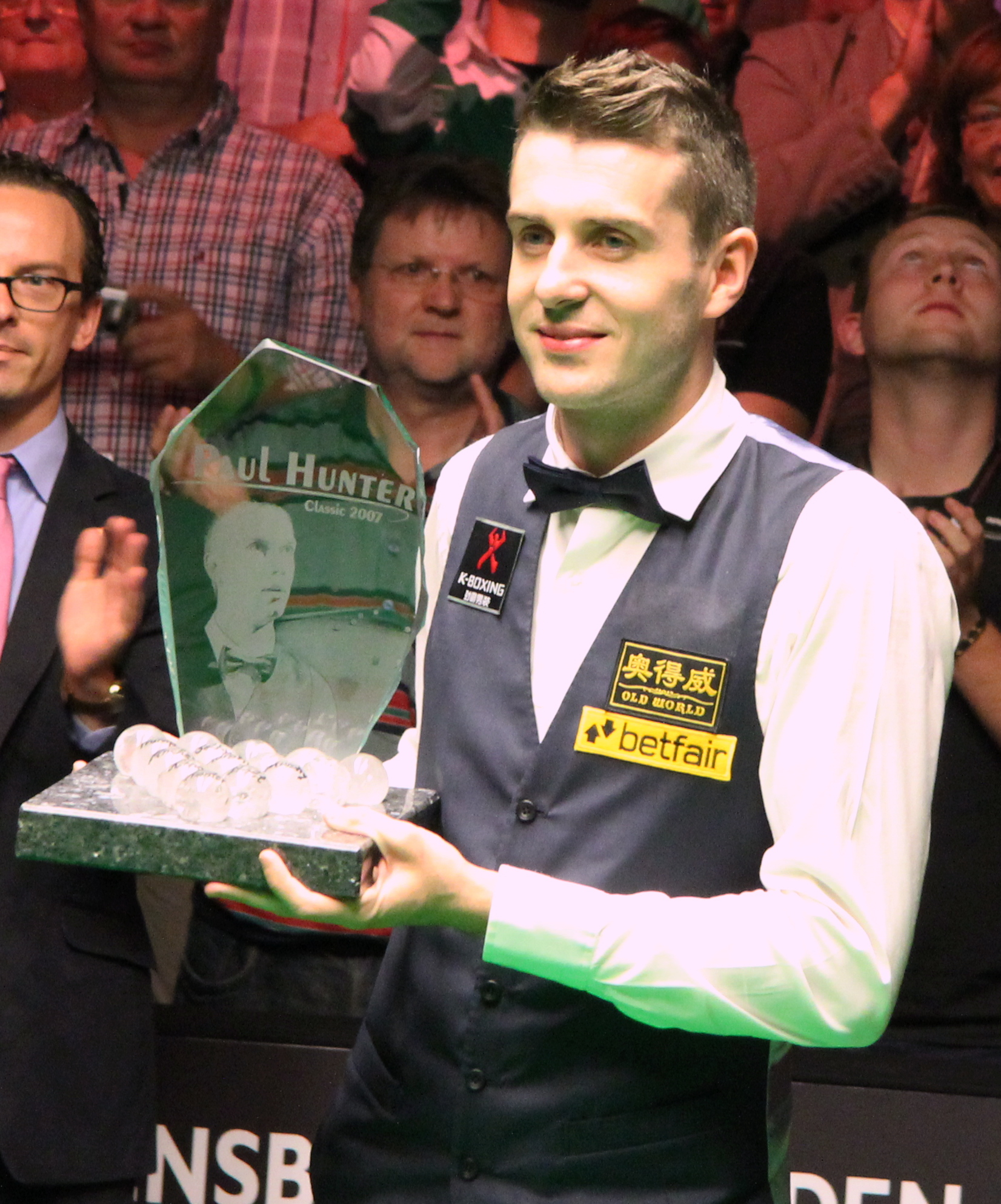 Mark Selby mit Siegerpokal beim Paul Hunter Classic 2012